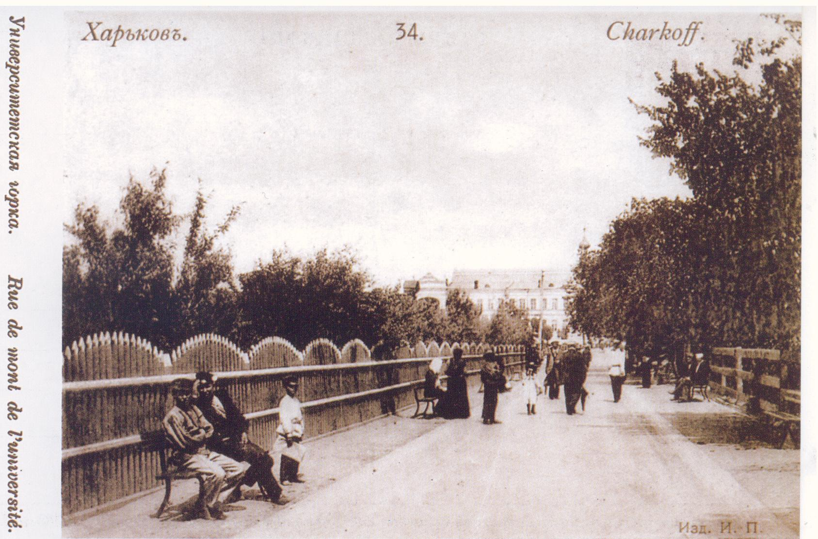 Chakroff Rue de Mont de LUniversite. Russian Empire Postcard Kharkov. View from University Hill. Kupechesky Spusk in left. Pokrovsky monastery is прямо. Reprint.